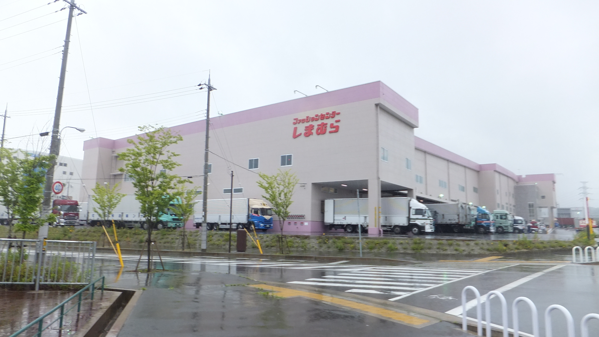 しまむら 神戸商品センター